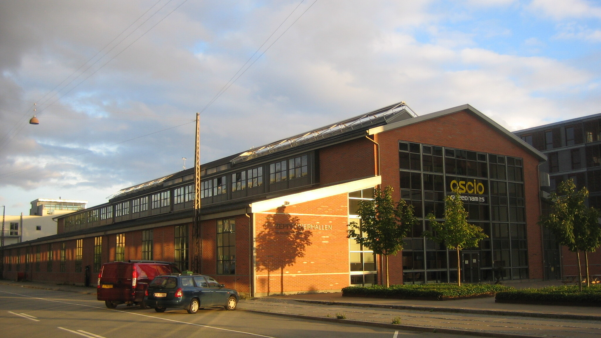 Zeppelinerhallen på Islands Brygge i aftensol